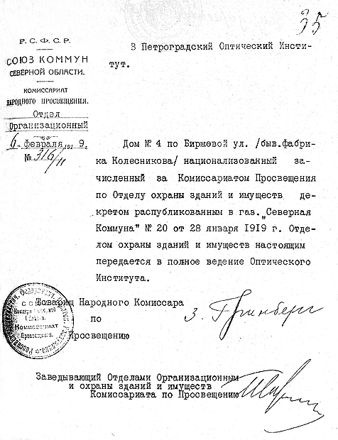 Письмо о передаче здания в введение ГОИ